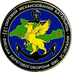 Нарукавна нашивка 501-го окремого механізованого батальйону військ берегової оборони України